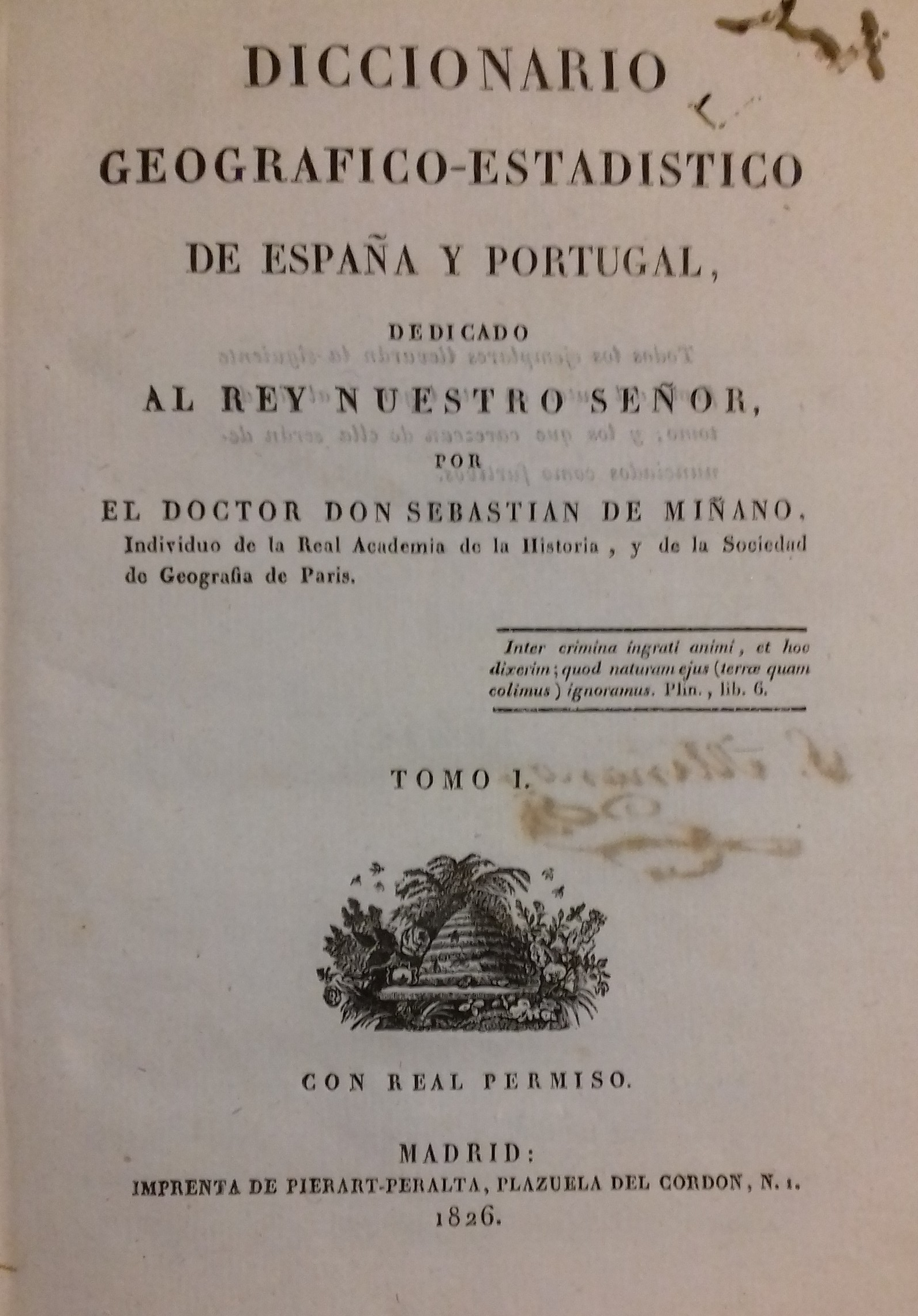 Capa interior do 'Diccionario geográfico-estadístico de España y Portugal' de Sebastián Miñano